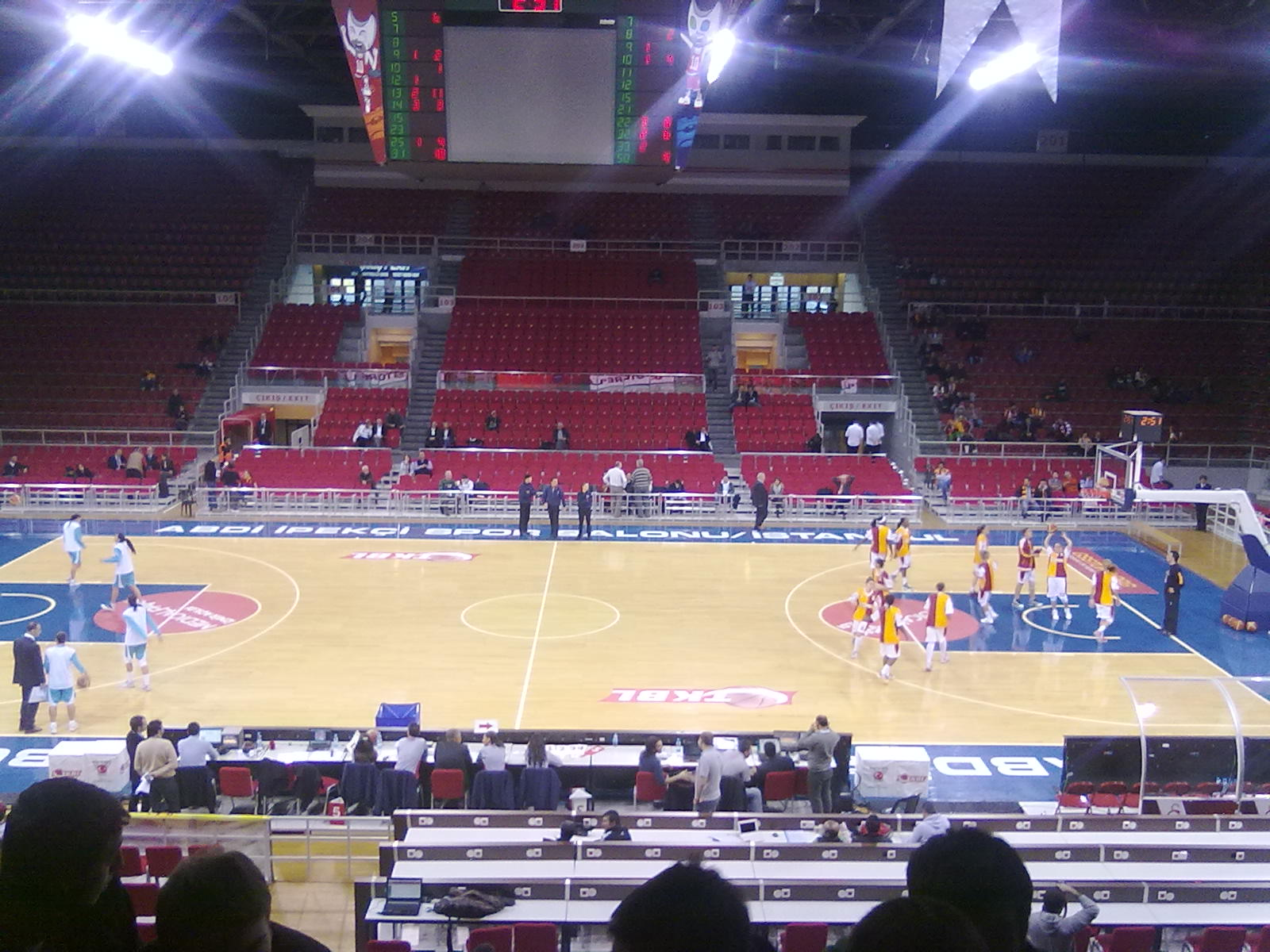 Galatasaray MP - Tarsus Belediyesi BK (19-11-2011)